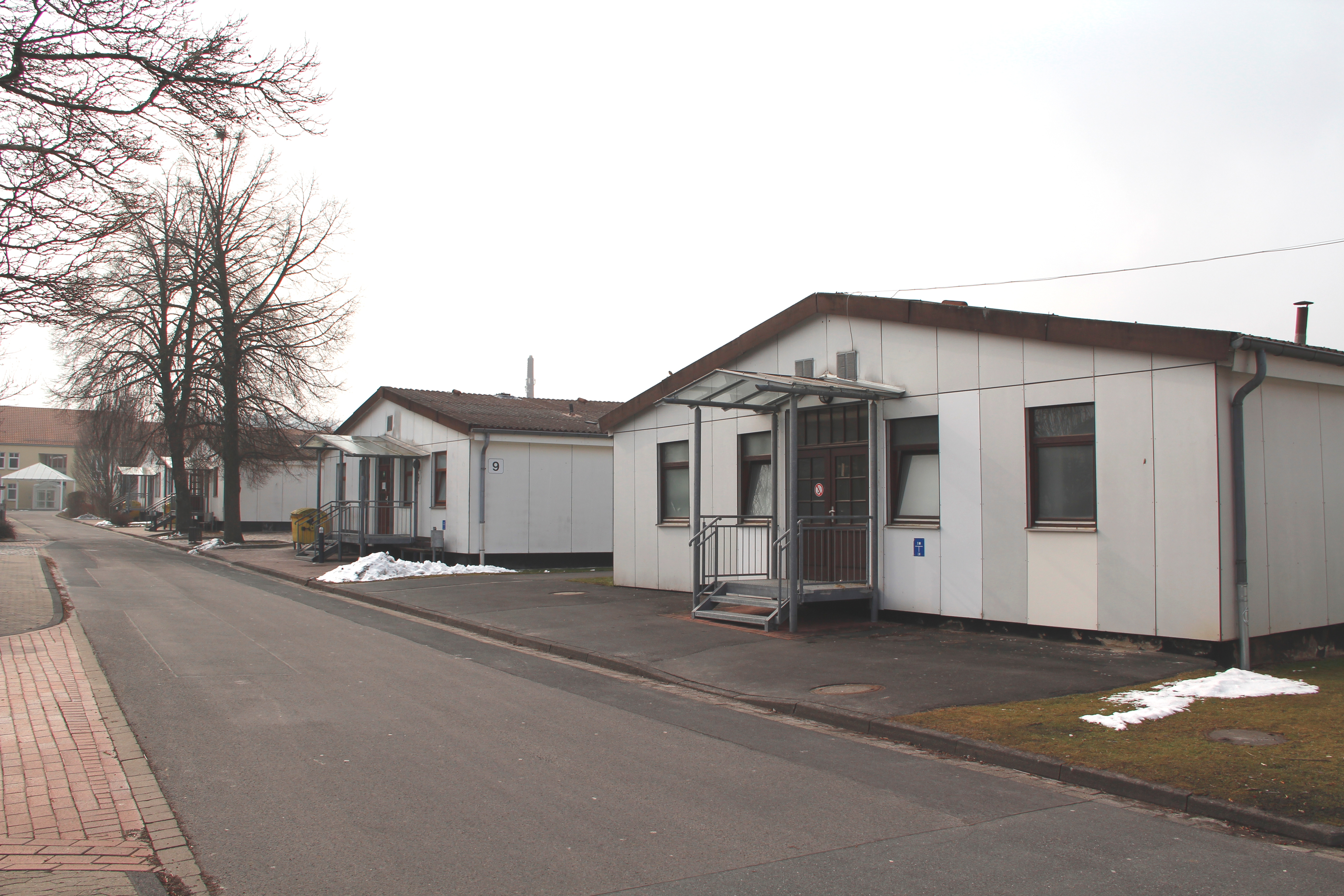 Lager Friedland 2013